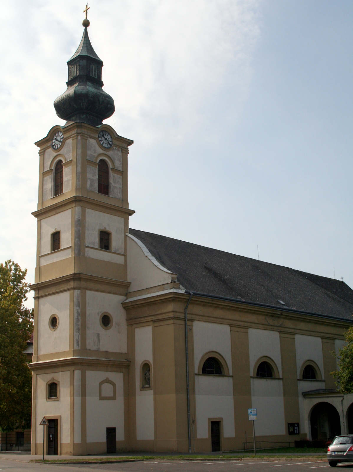 R. k. templom (Szentes, Szent Imre Herceg utca 2.) This is a photo of a monument in Hungary. Identifier: 3540